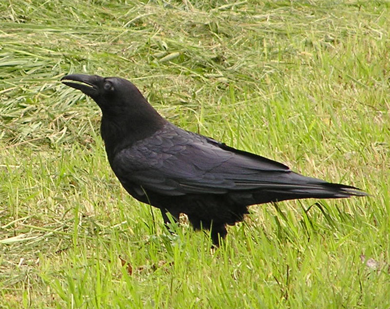 Kolkrabe Kraxi aus Viechtwang in Oberösterreich (eigenes Foto).